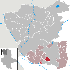 (Original text: Jerchel im Landkreis Salzwedel)